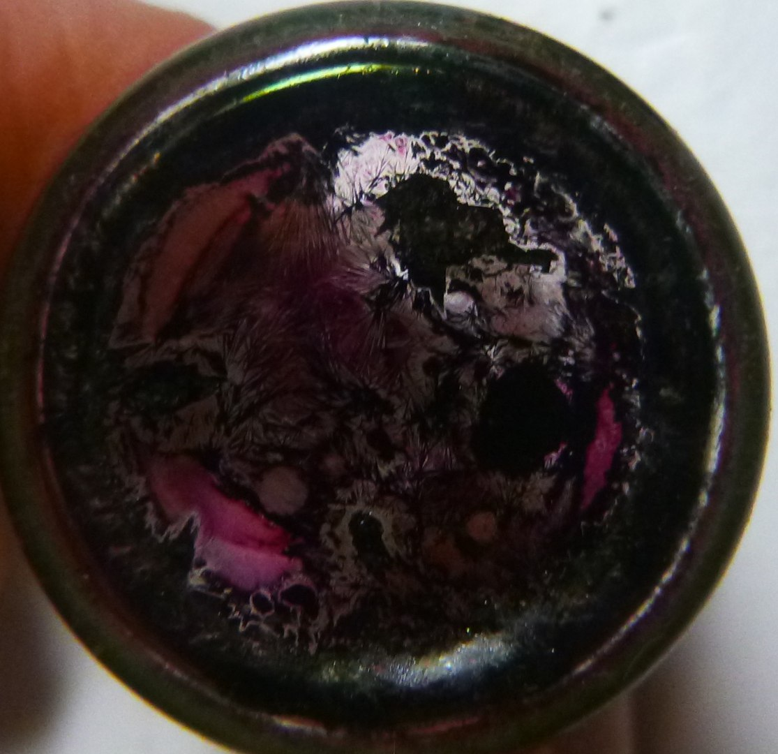 Чистый марганцовый ангидрид в твердом состоянии при температуре -15°C. Pure manganese heptoxide in solid state at -15°C.